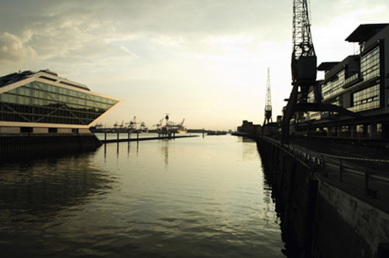 Elbkaihaus